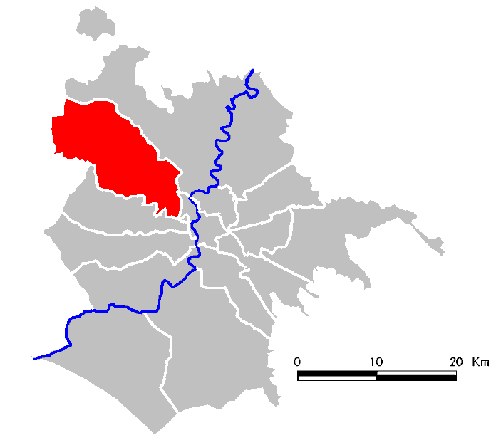 Municipio Roma XIV